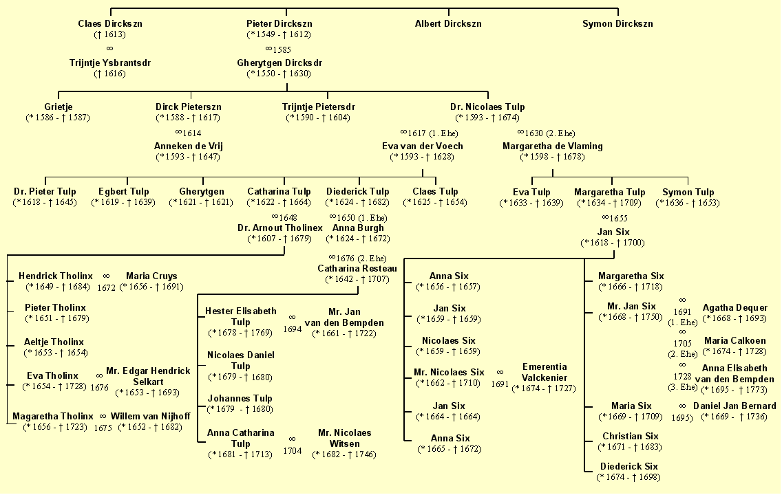 Stammbaum der Familie Dr. Nicolaes Tulp und z. T. von Jan Six, sowie die Vorfahren der Gattin des Kartographen Nicolaas Witsen